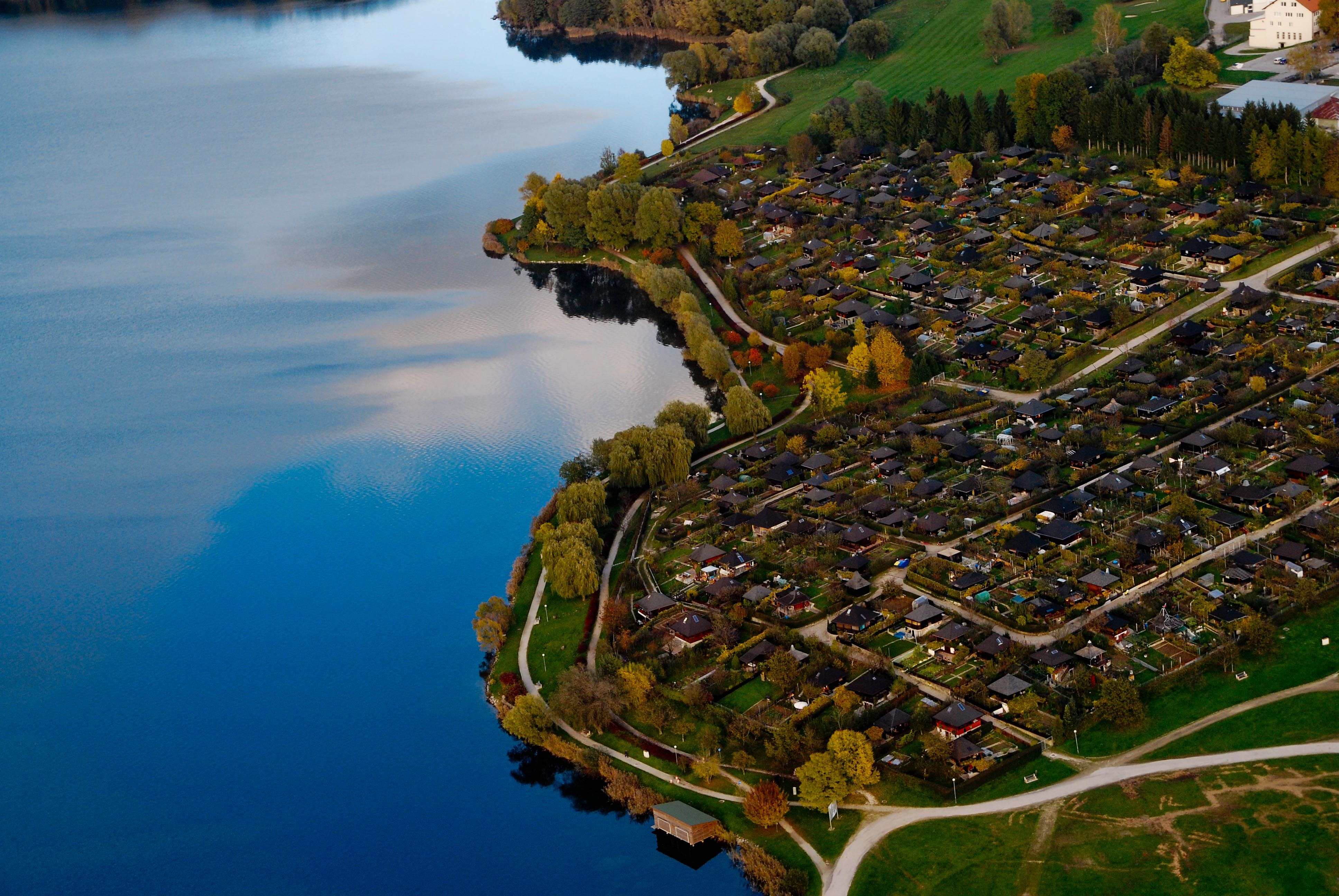 Velenje z zraka.